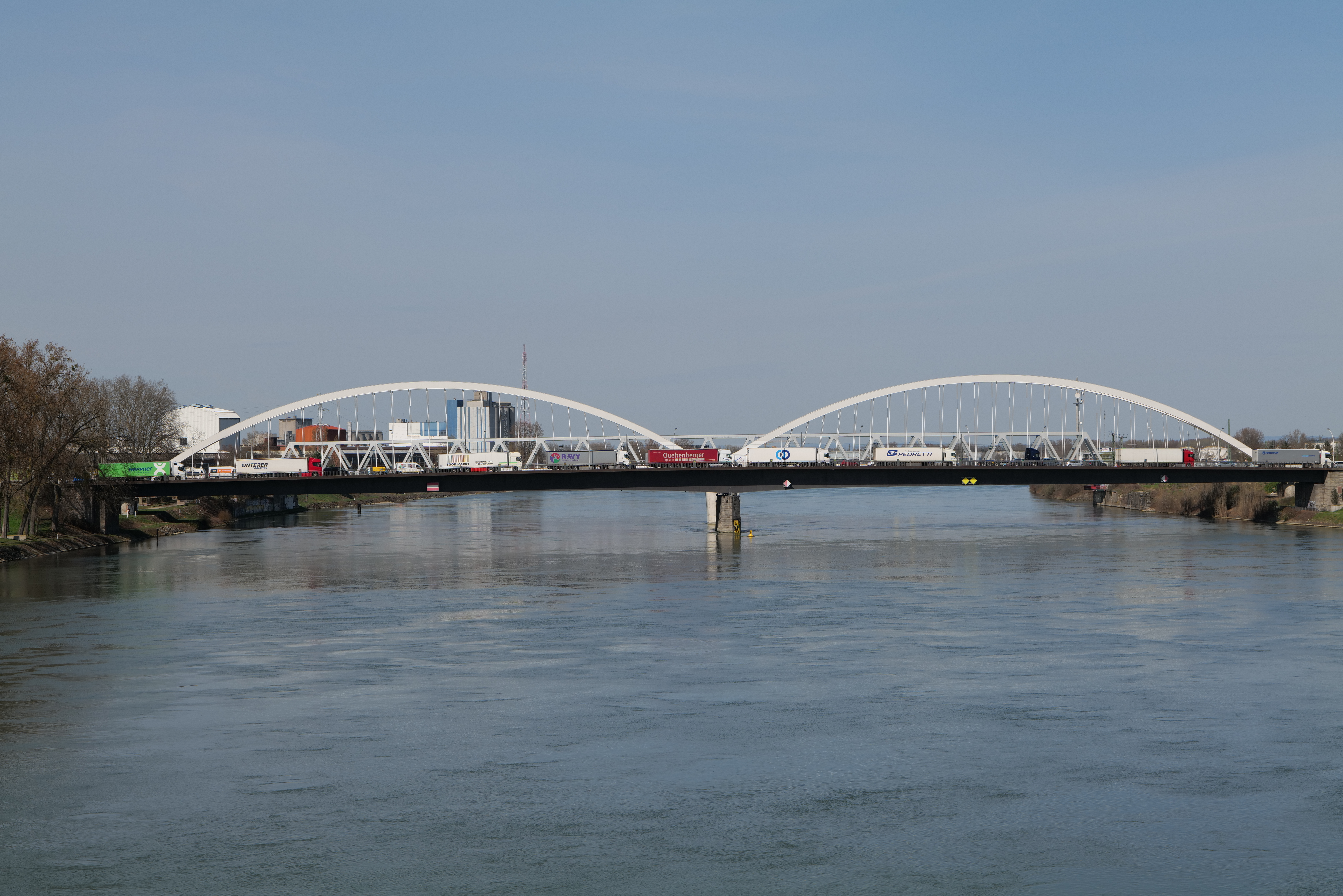 Warteschlange aus Fahrzeugen vor den Grenzkontrollen von Ankommenden auf der deutschen Seite der Europabrücke zwischen Straßburg und Kehl am 16. März 2020.